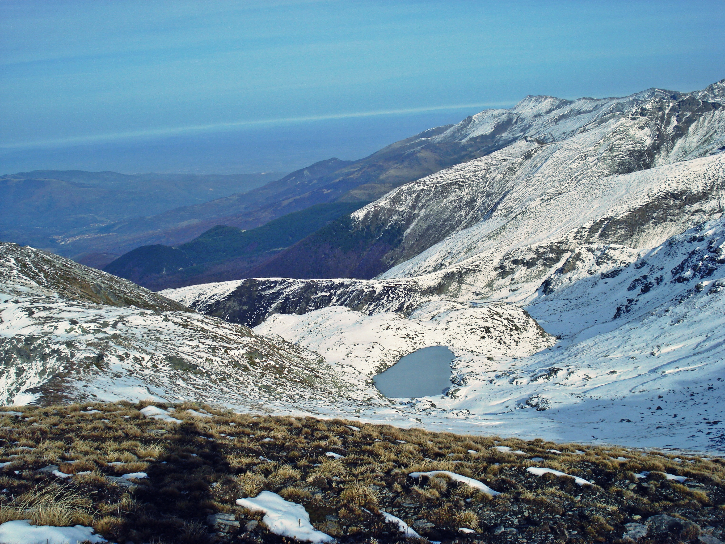 Pamje gjate ngjitjes te Maja e Konjushës, në malet e Sharrit.